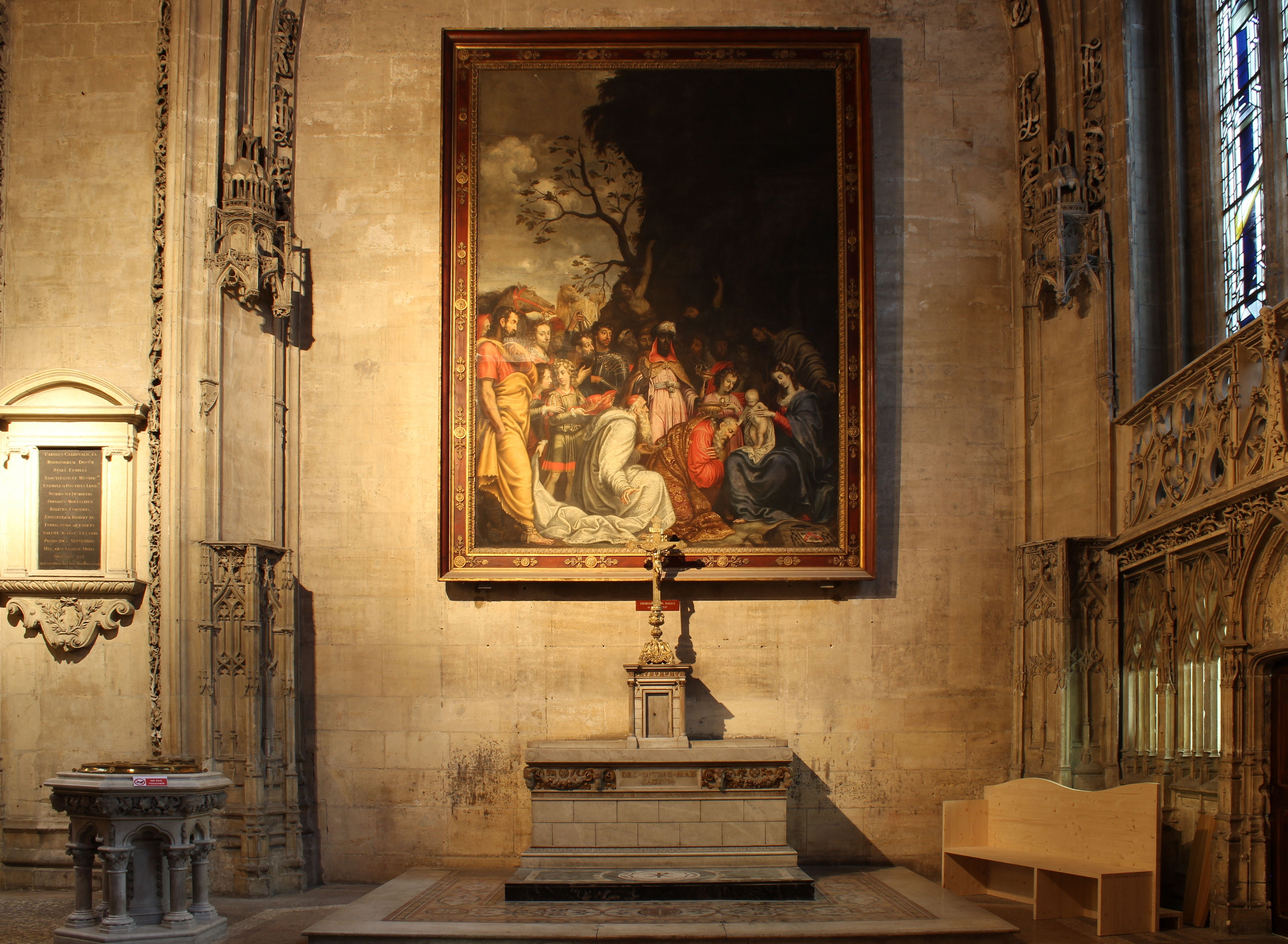 Autel dans la chapelle des fonts baptismaux de la Primatiale Saint-Jean à Lyon.